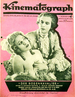 Titelbild Kinematograph Rosenkavalier 1926